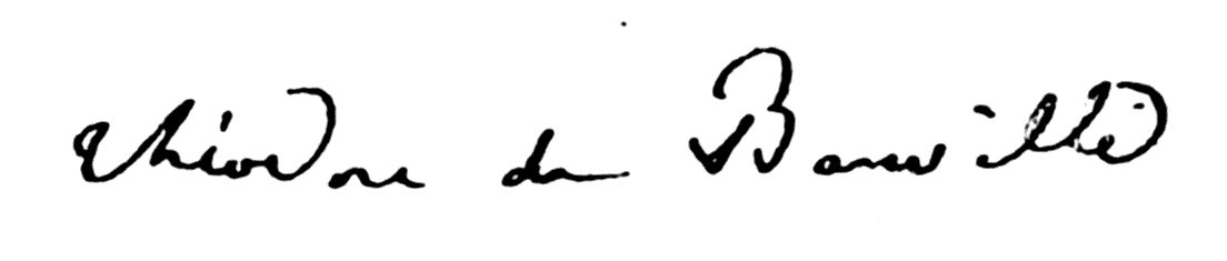 Signature Théodore de Banville